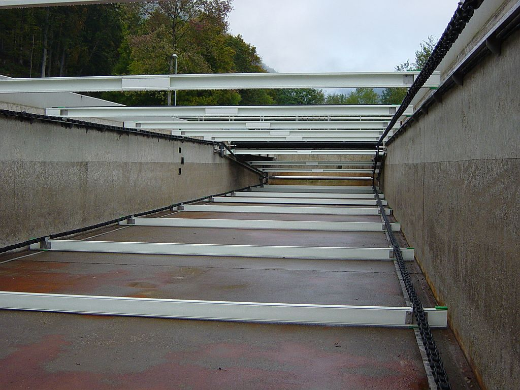 Aufbau eines Kettenräumers im Klärbecken.